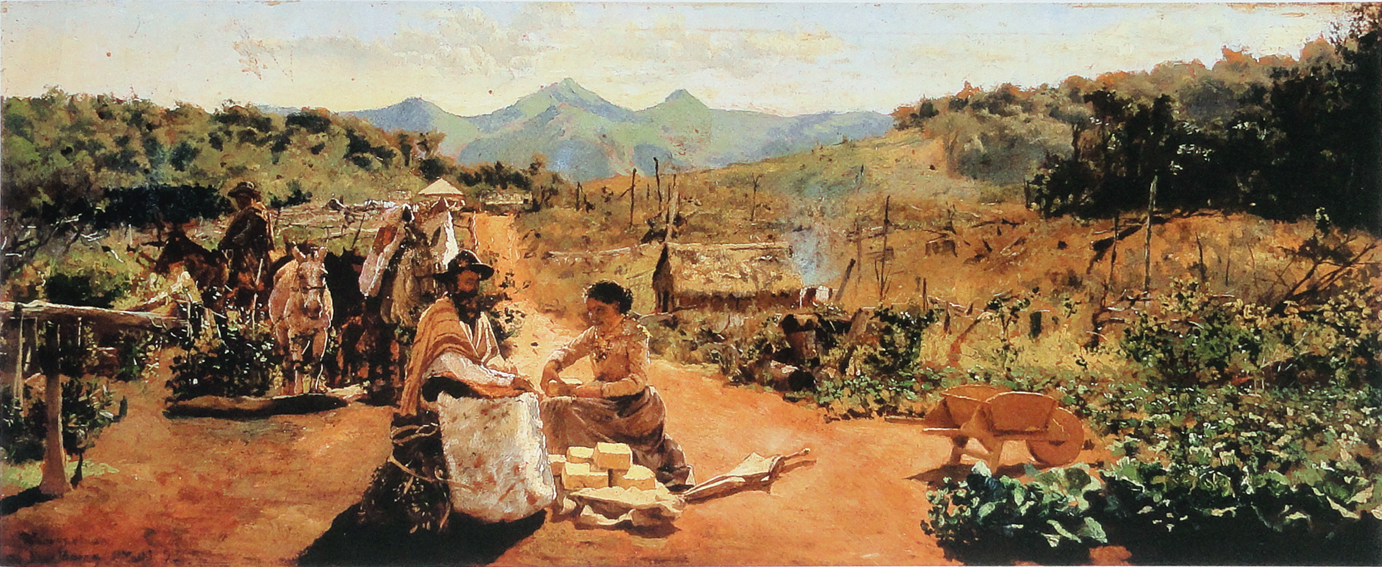 Nova Veneza, óleo sobre madeira, 18 x 43 cm, coleção particular